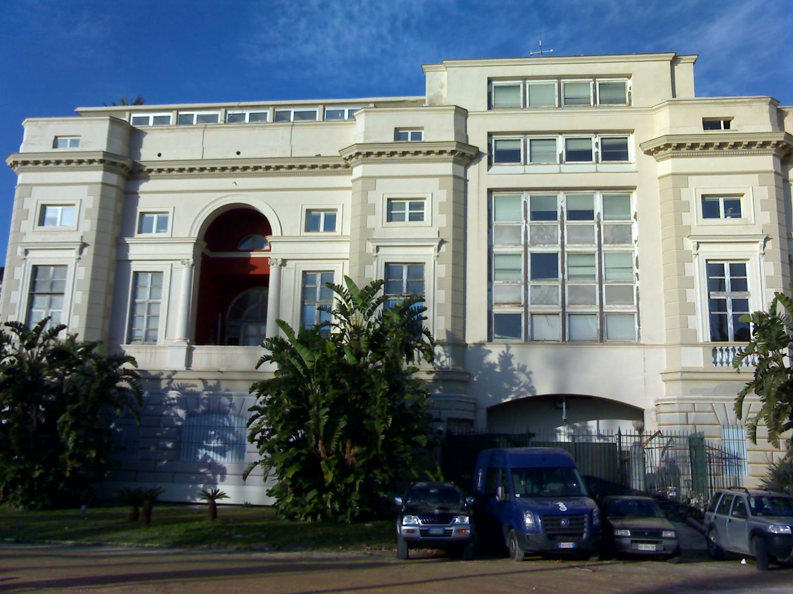 Lato sinistro della facciata della Stazione Anton Dohrn (Napoli)